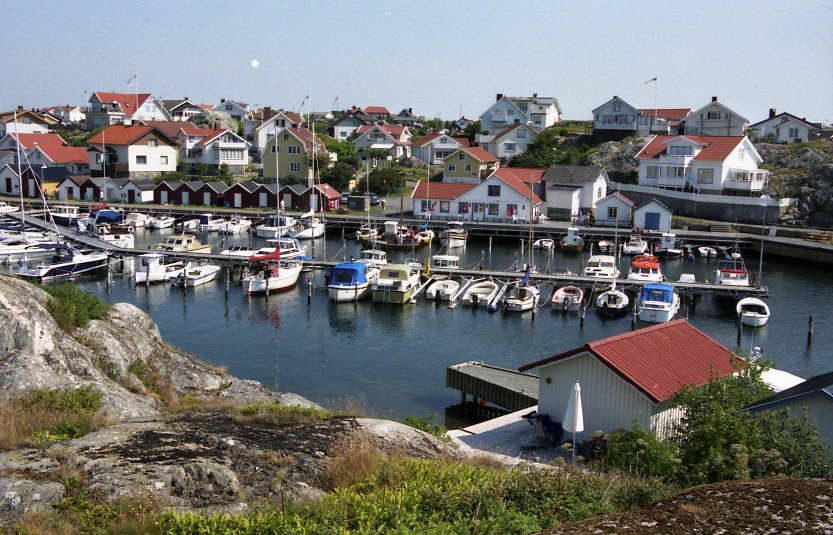 Hamnen på Fotö